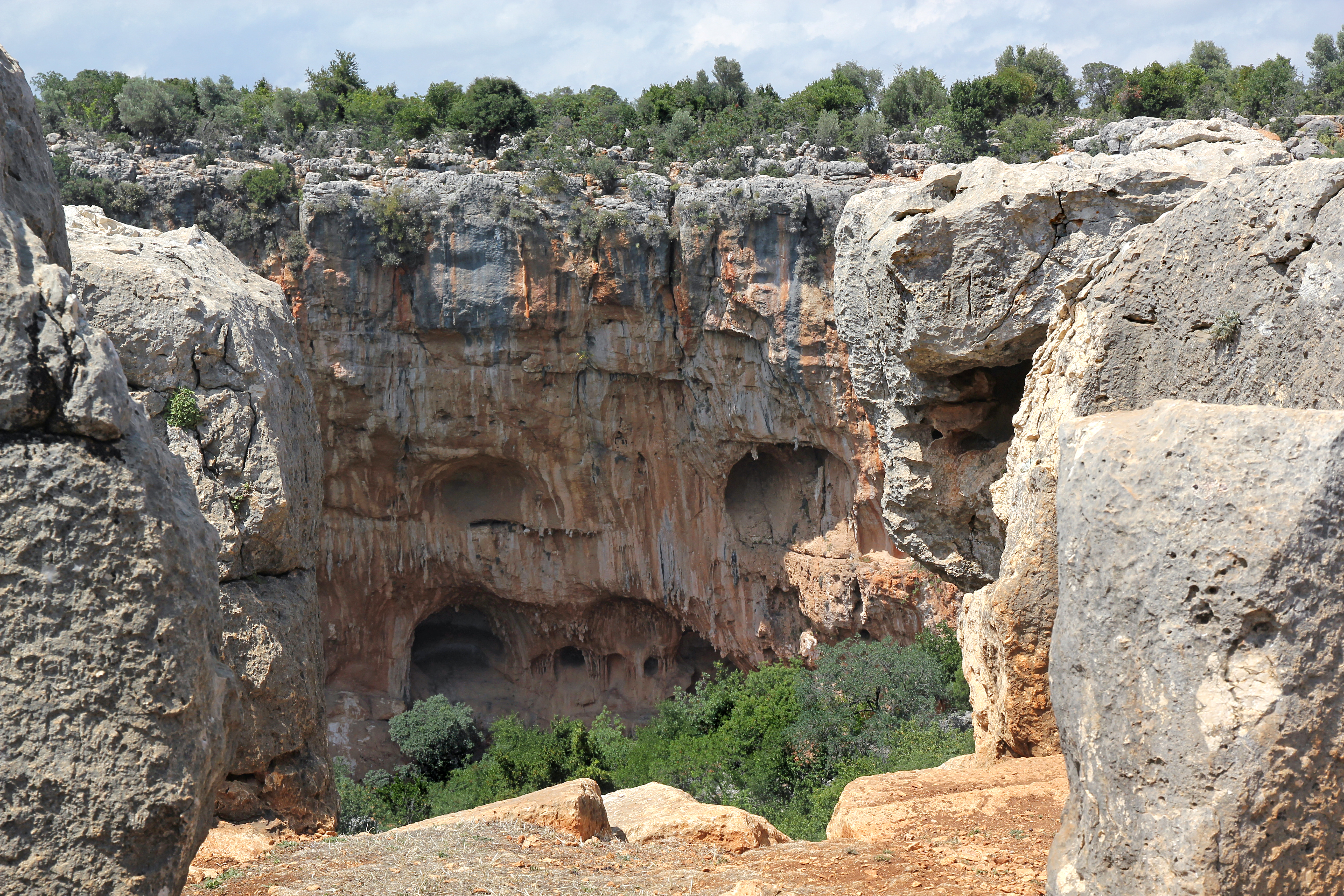 Aşağı Dünya, Doline mit antiker Siedlung im Rauhen Kilikien, Südtürkei